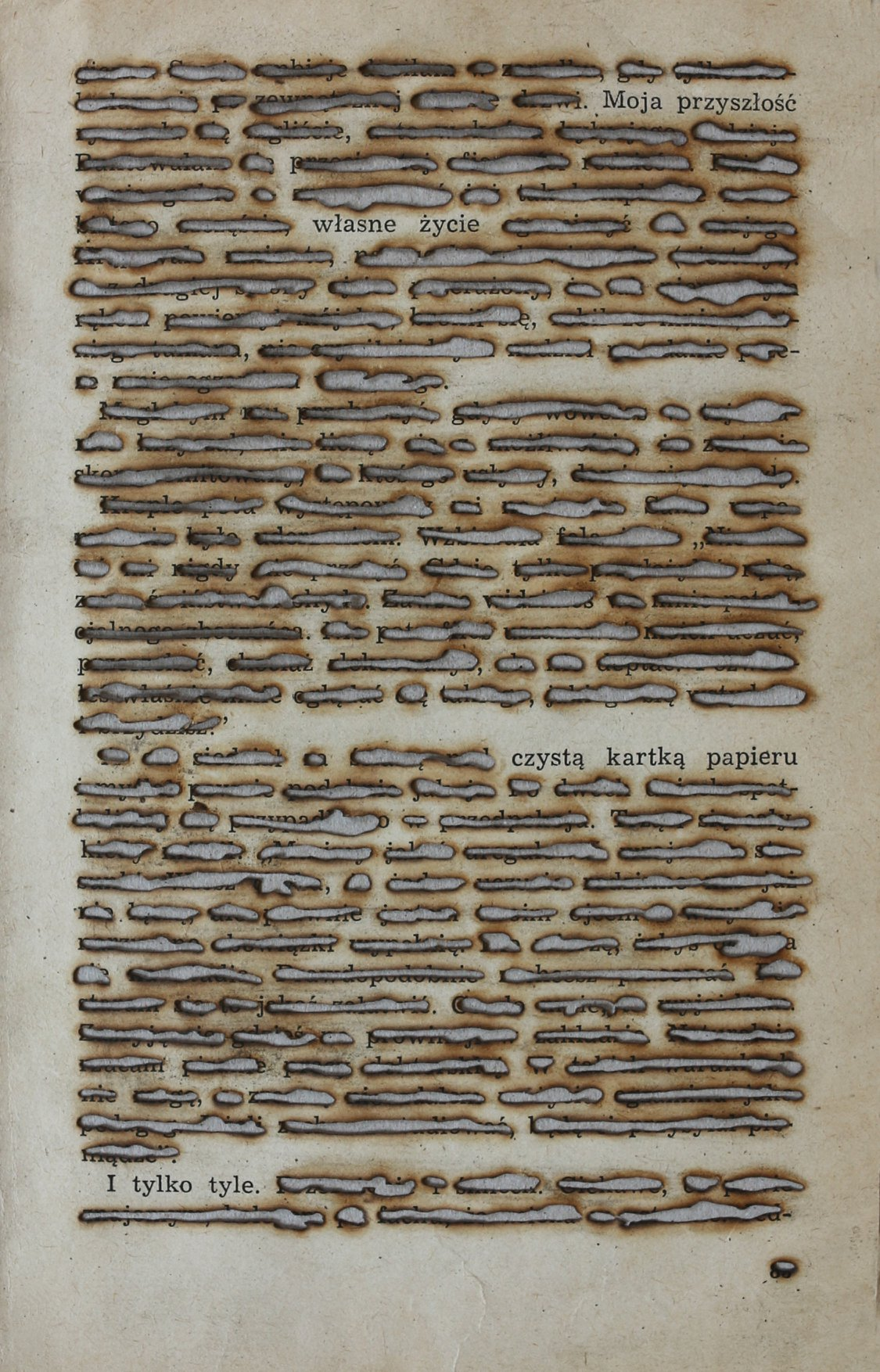 Praca Zuzanny Dolegi z cyklu "Pirosłowa – bez(słownik)" wykonana techniką pirografii.